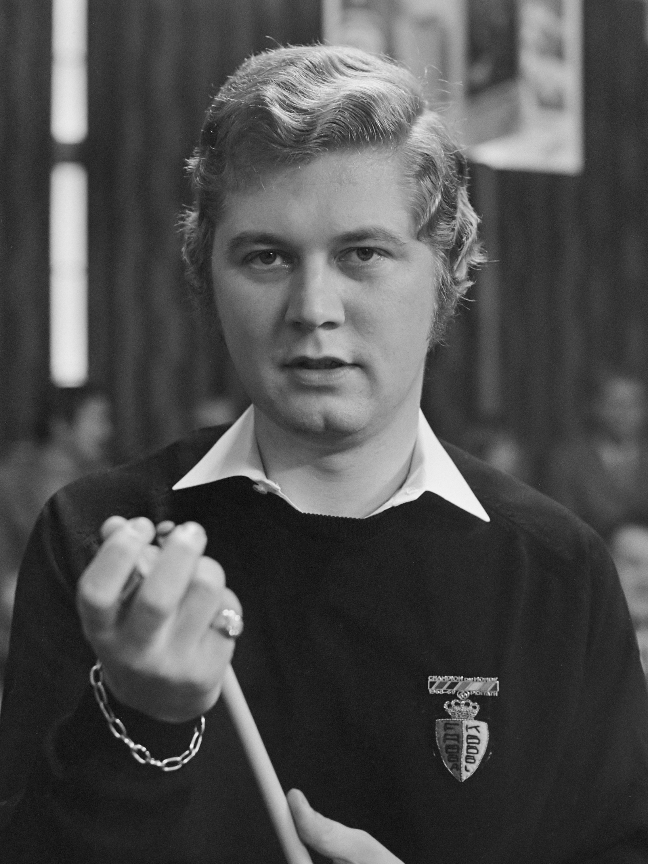 Driebanden biljarten Interland, Nederland tegen Belgie, Dielis 4 november 1972